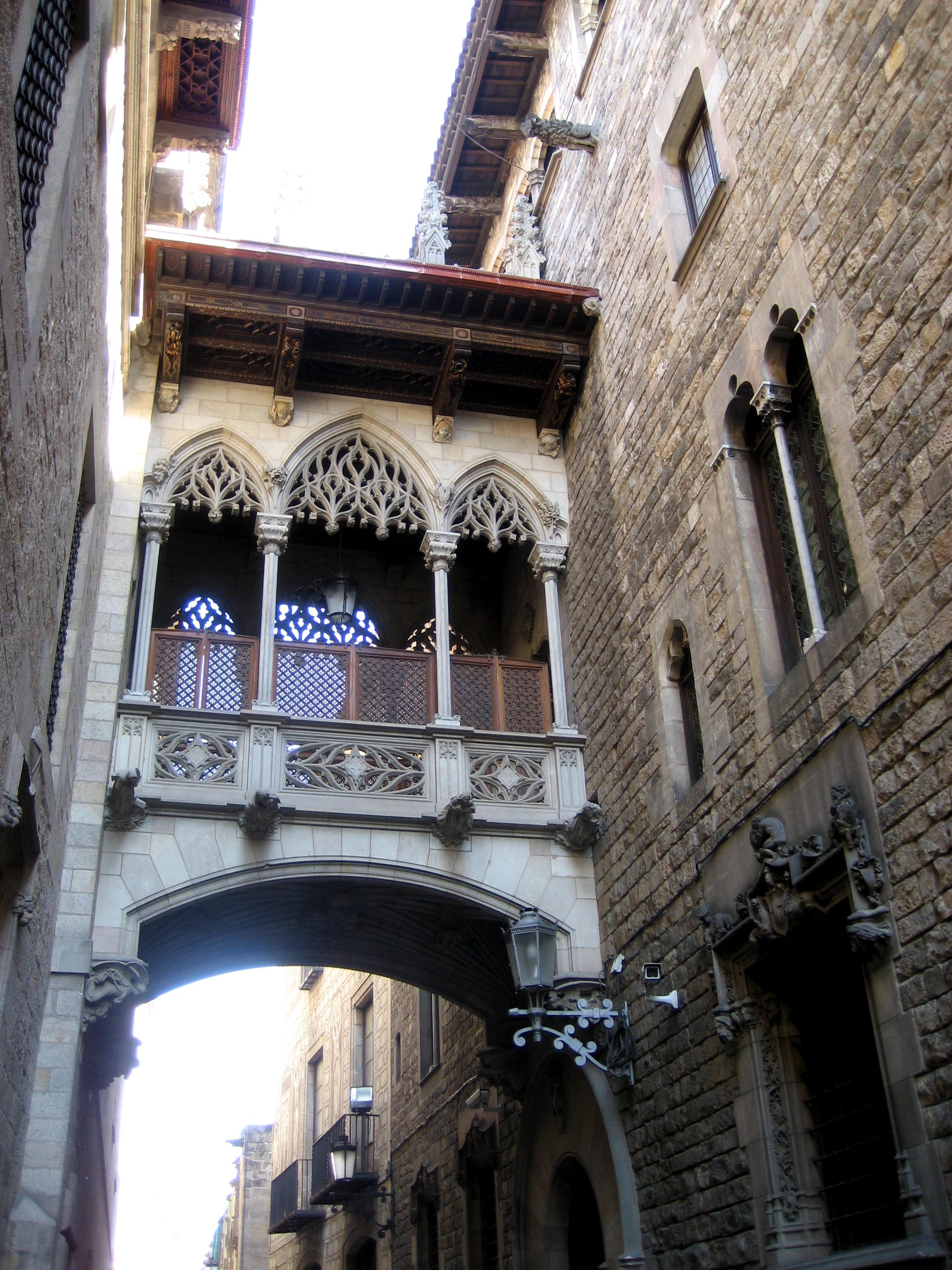 Puente neogótico de la calle del obispo del Palacio de la Generalidad de Cataluña